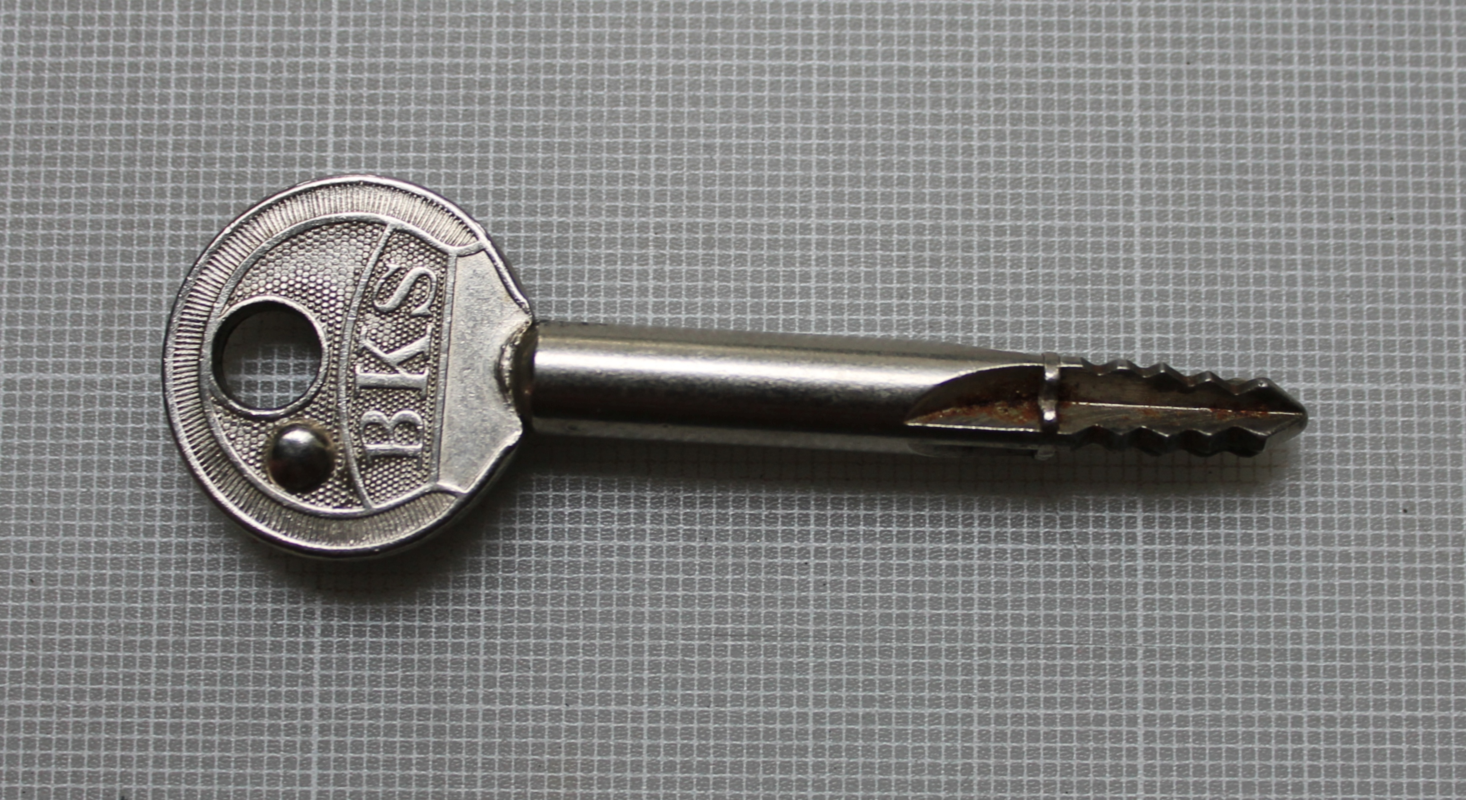 BKS-Kreuzbartschlüssel